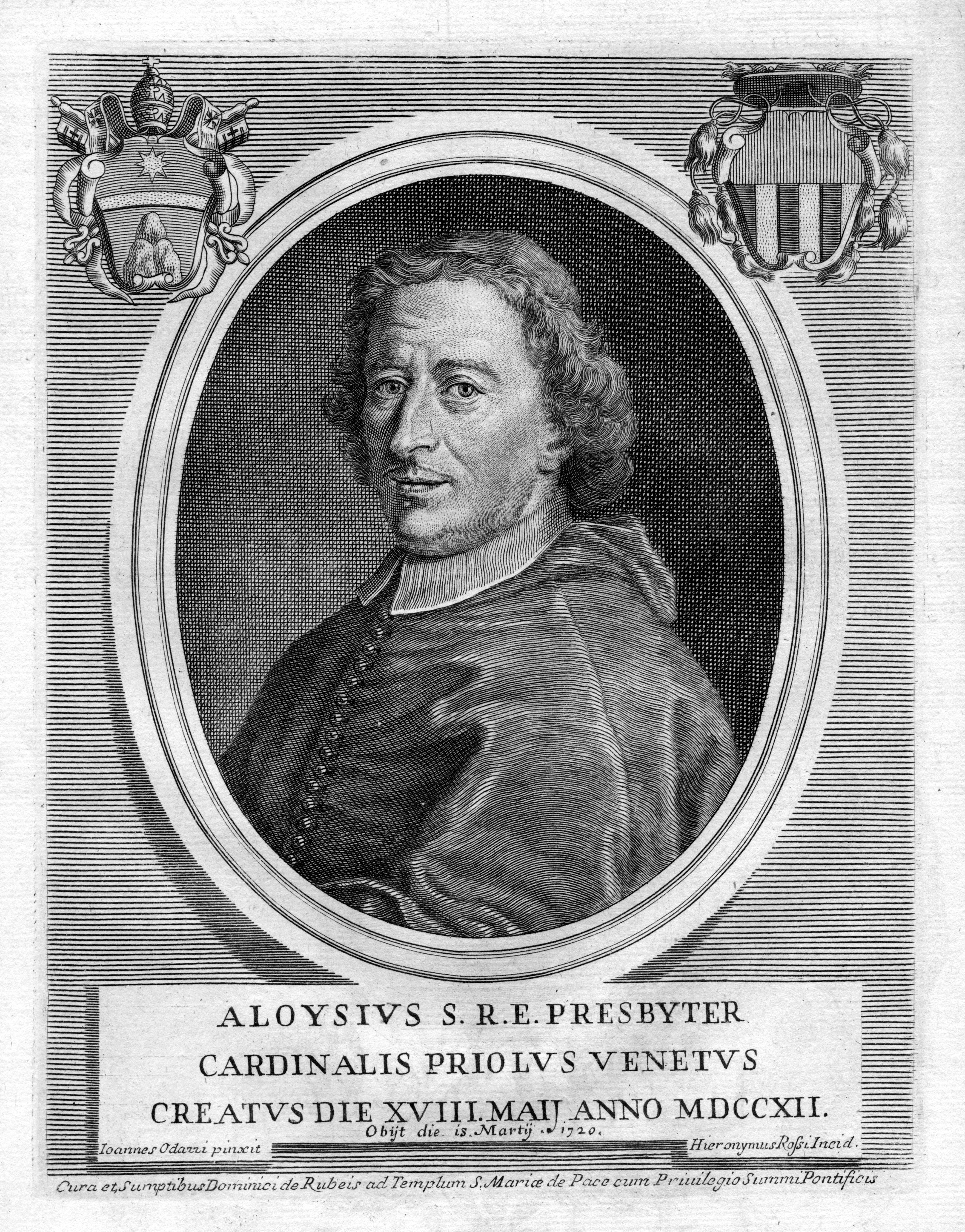 portrait gravé